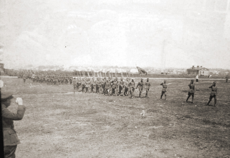 Парад 6-ї Січової дивізії військ УНР. Бердичів, травень 1920